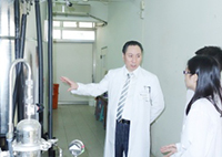 南台科技大学客員教授戴峰が研究室で生徒を指導。